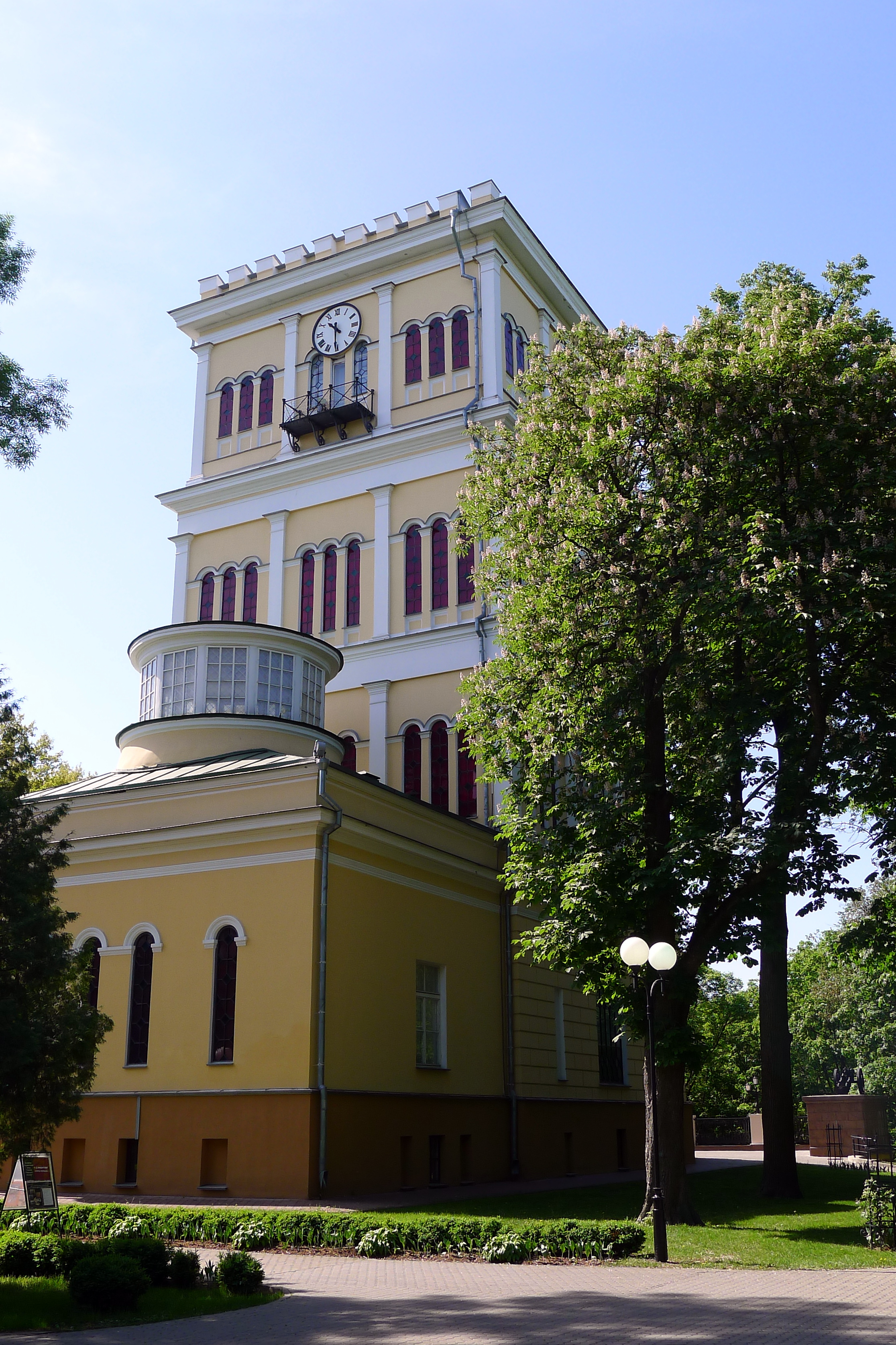 Четырехэтажная башня дворцового комплекса Румянцевых-Паскевичей в Гомеле (Беларусь)